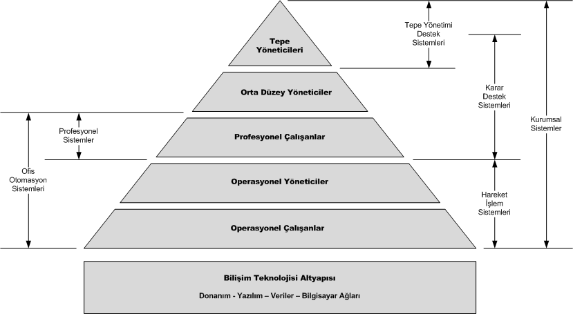 Örgüt yapısı, kurumsal kullanıcılar ve bilişim sistemleri